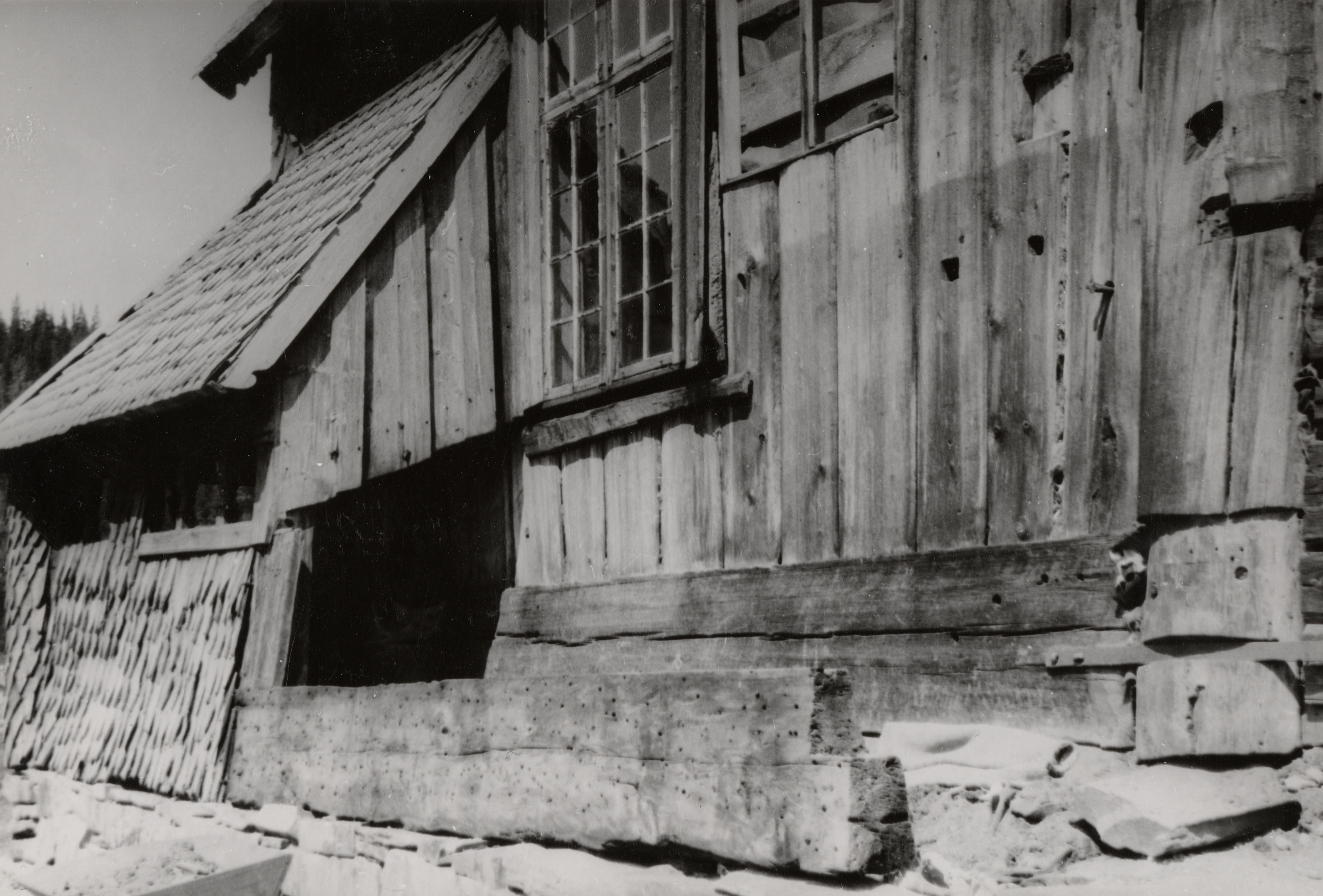 Eidsborg stavkirke i Eidsborg, Telemark